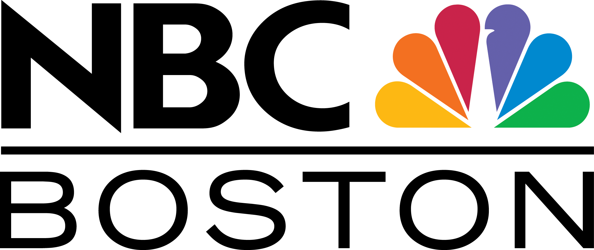 Logo de NBC Boston, la futura emisora propia de NBC para el Área Metropolitana de Boston.